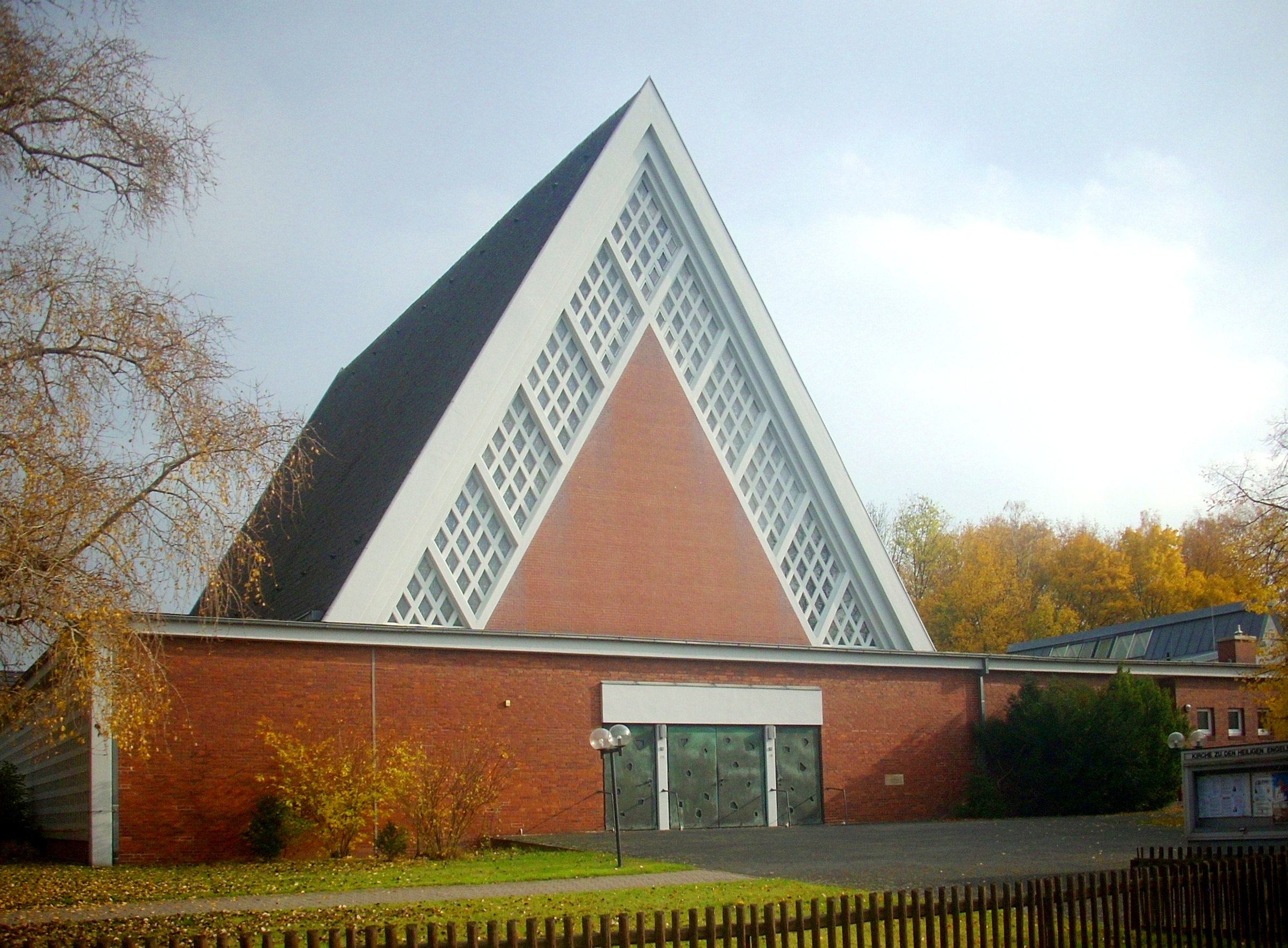 Hannover-Kirchrode, katholische Kirche Zu den heiligen Engeln